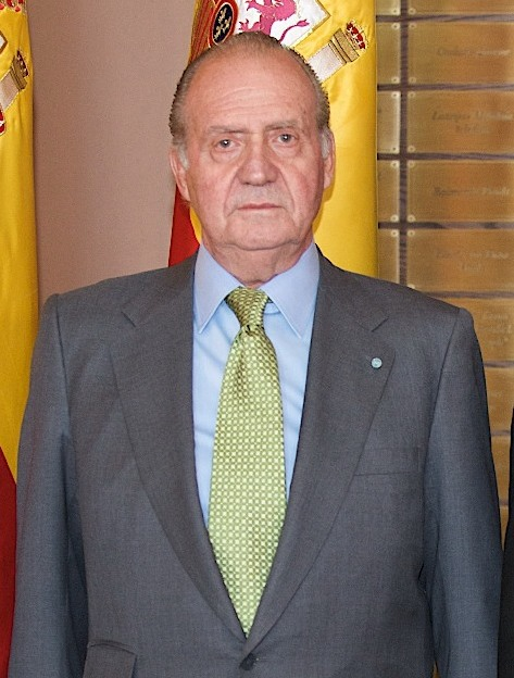 Ministru prezidents Valdis Dombrovskis ar dzīvesbiedri Āriju (no kreisās) un Spānijas karalis Huans Karloss I un karaliene Sofija, 2009.gada 6.maijs